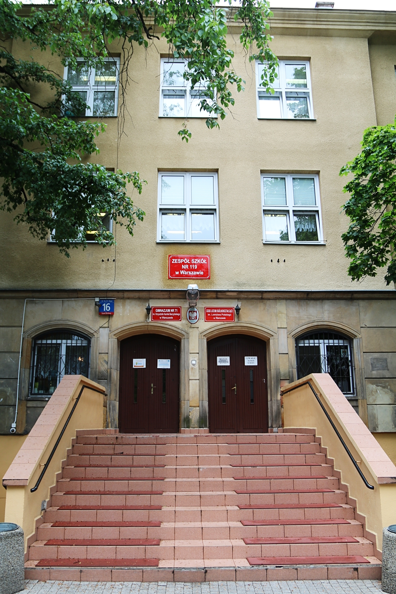 Wejście do liceum im. Lotnictwa Polskiego oraz Gimnazjum im. K.K. Baczyńskiego w Warszawie